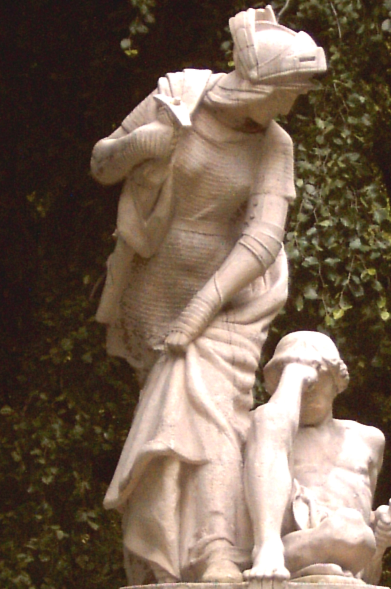 Kraków, Poland